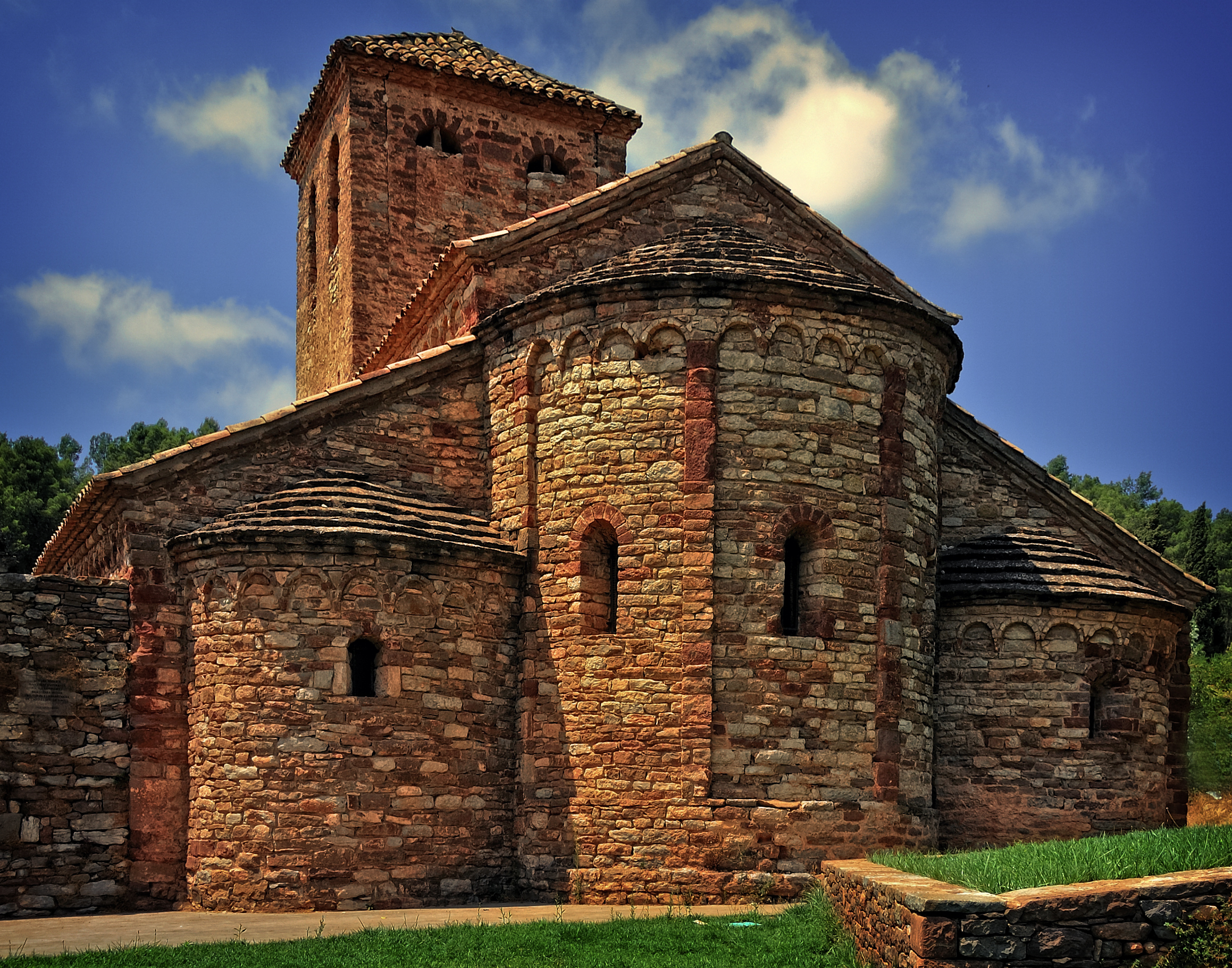 View On Black aka Benquerencia/ View My Recent In Onexposure El primer documento que hay de la iglesia es del siglo X y aparece con el antiguo nombre de Buc, que despu�s fue cambiado por el actual. En 1032 aparece ya como Sant Andreu y como parroquia. Fue transformada y despu�s mutilada. En 1976, fue restaurada y devuelta a su estado primitivo. Es un edificio de planta basilical de tres naves, cubiertas con b�vedas de ca��n y cabeceadas por tres �bsides semicirculares. La nave central es m�s alta que las laterales, lo cual hace que el �bside central tenga mayor dimensi�n que las absidiolas laterales. Este �bside central est� iluminado por tres ventanas, mientras que los laterales solo tienen una y m�s peque�as que las del �bside central. Destaca su decoraci�n lombarda que ocupa los dos muros, la fachada de poniente y tambi�n la cabecera. Un friso de arquer�as lombardas entre lesenas decora el �bside central, las absidiolas laterales est�n decoradas solo con un friso de arquer�as ciegas. Un friso de arquer�as ciegas bajo el alero, decora los muros de las naves laterales y los de la central que sobresalen de los tejados.En la fachada de poniente, si bien ha sido modificada por la puerta moderna y un campanario de �poca posterior encima, tambi�n podemos observar resiguiendo los vertientes de la cubierta un friso de arquer�as ciegas. La puerta original estaba en el muro sur, pero hoy est� tapiada; pese a ello se aprecia su sencillez, con un arco de medio punto adovelado. En el muro norte hay otra puerta, tapiada, con un arco de medio punto adovelado. El portal actual de acceso es moderno y se abre a la fachada oeste.